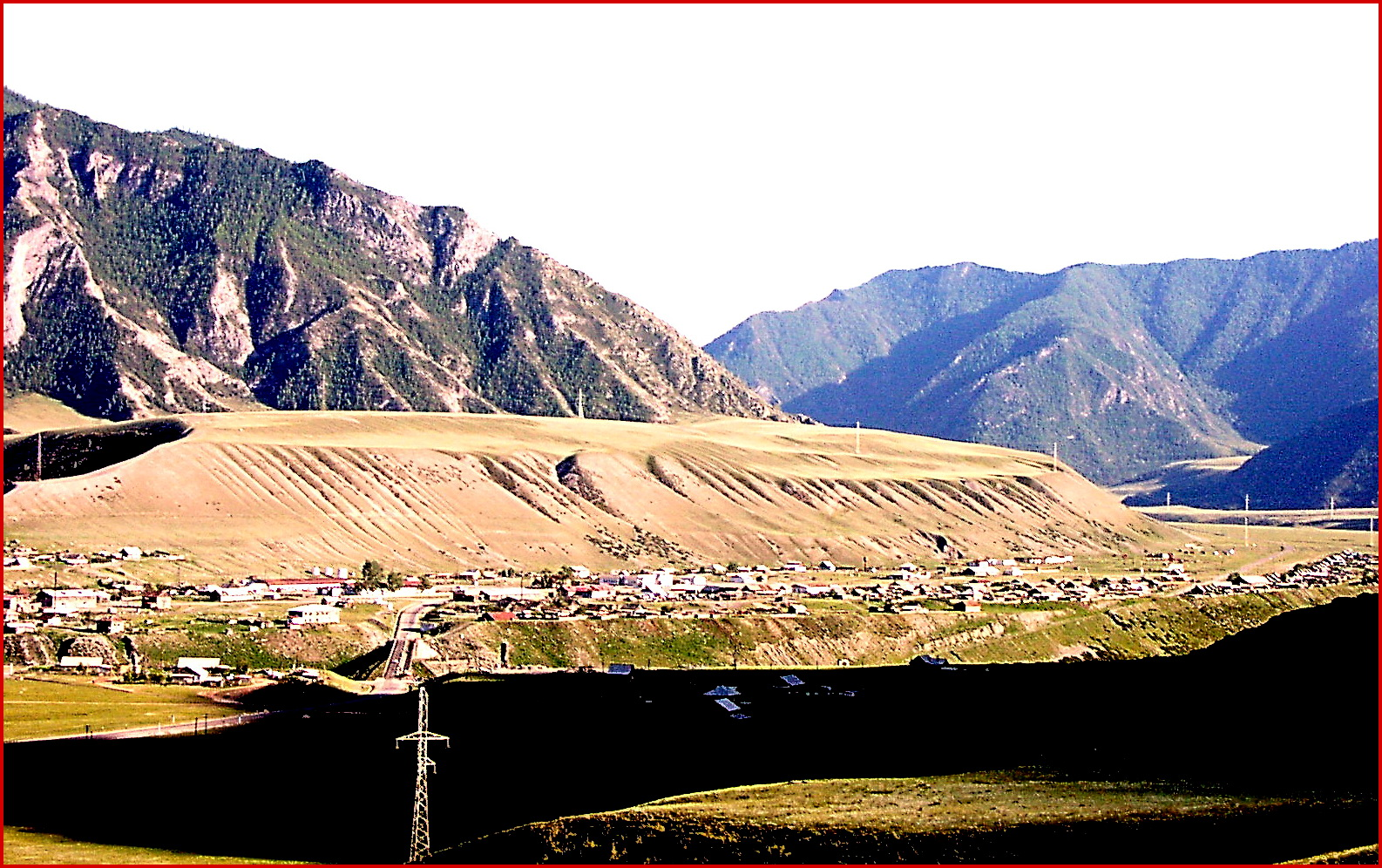 Дилювиально-аккумулятивная терраса в устьевой части долины р. Иня, правый приток р. Катунь, Горный Алтай. Высота террасы - свыше 240 м от современного уреза Катуни.